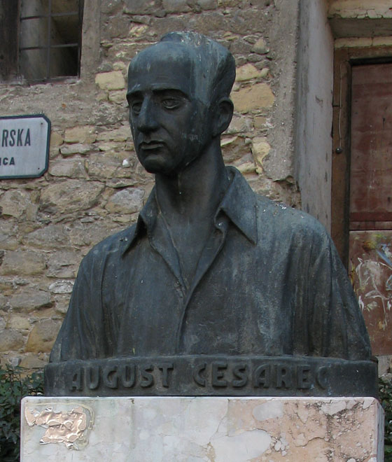 Spomenik Augustu Cesarcu u Zagrebu, Tkalčićeva